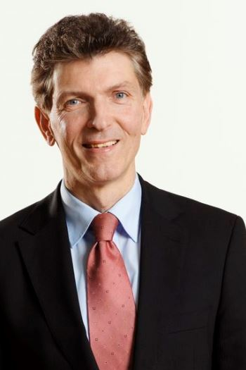 Prof. Dr. Gerhard Waschler, Mitglied des Bayerischen Landtags